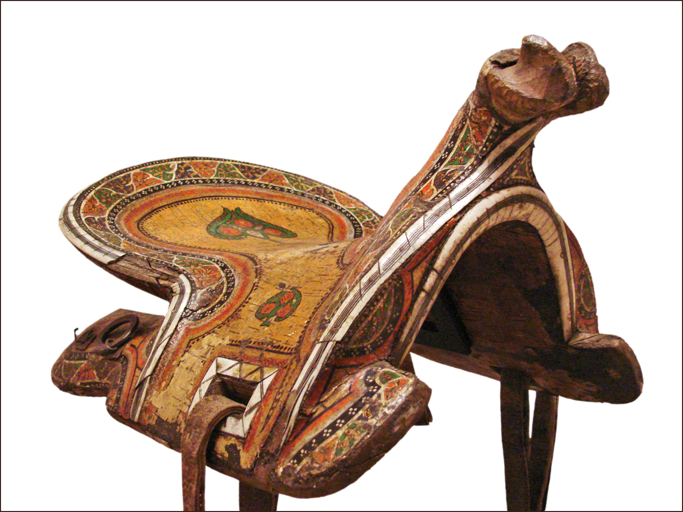 Selle de cheval (détail) Horse saddle Population Ouzbek Ouzbékistan, Boukhara 19è-20è siècle bois, écorce de bouleau, os, cuir, fer don Citroën, Croisière jaune, 1931-1932 ancien objet des collections du musée de l'Homme Lire l'excellente présentation de cet objet sur le "catalogue des objets exposés" dans la rubrique documentation scientifique du musée en tapant dans le moteur de recherche "selle de cheval". On appréciera également la qualité des photographies proposées. site du musée